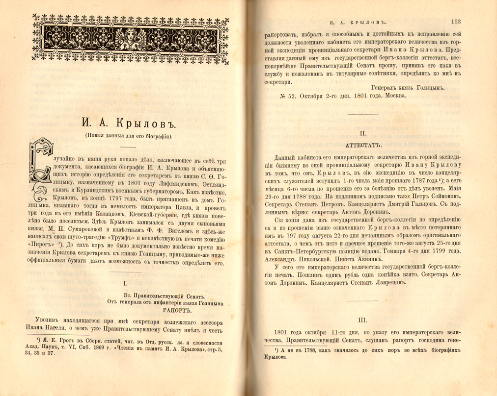 Ivan Krylov, article by Boris Modzalevsky